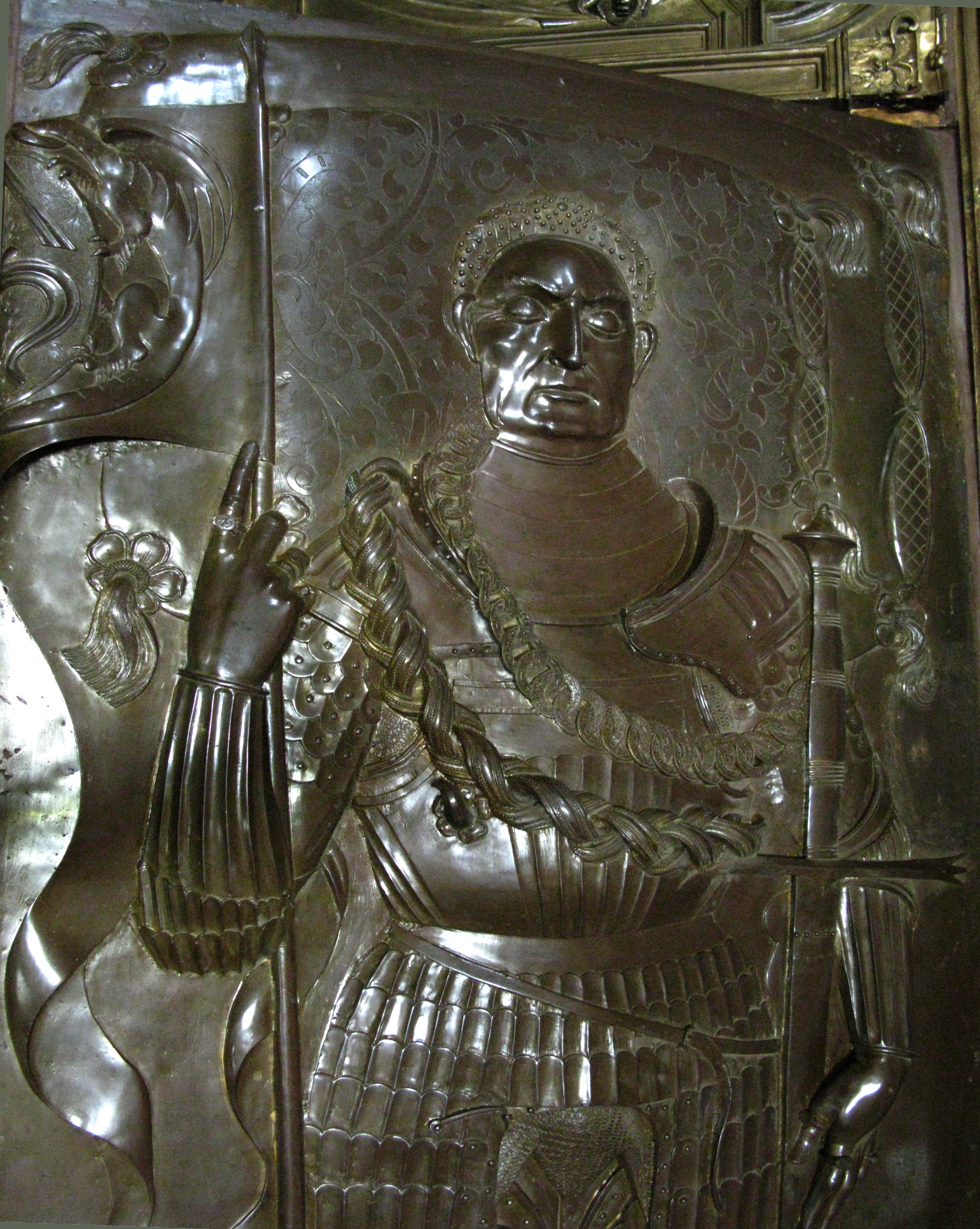 Krzysztof Szydłowiecki tomb effigy in Opatów XVI century image taken by user:Mathiasrex Maciej Szczepańczyk